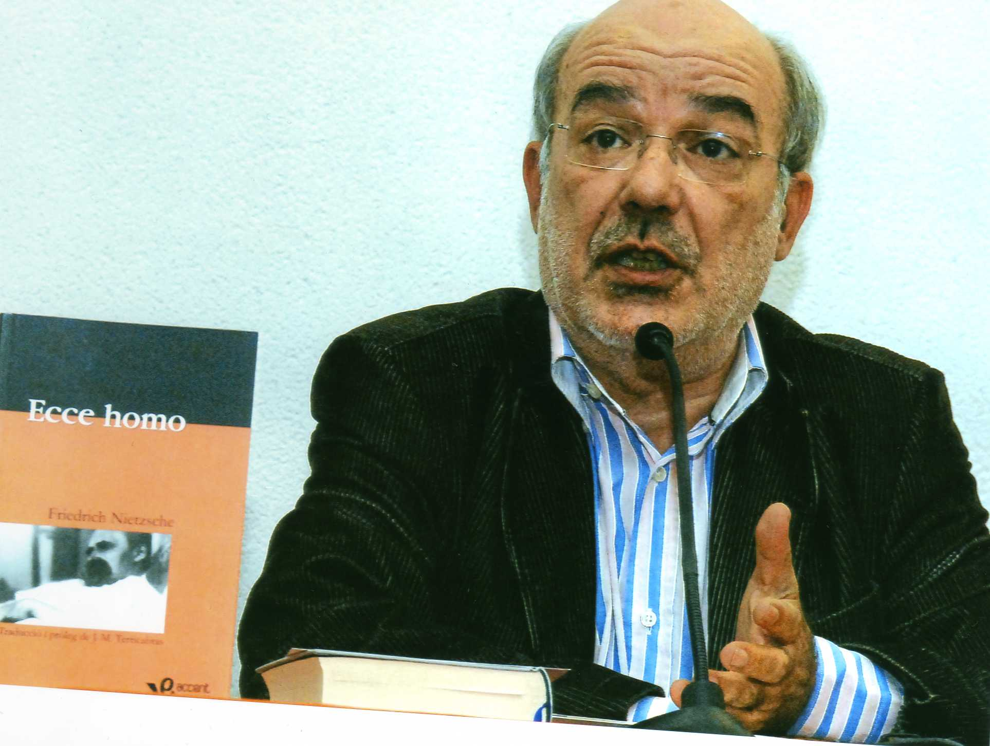 Presentació de la traducció de l'Ecce Homo de Nietzsche de Josep-Maria Terricabras a l'Ateneu Barcelonès (2009)